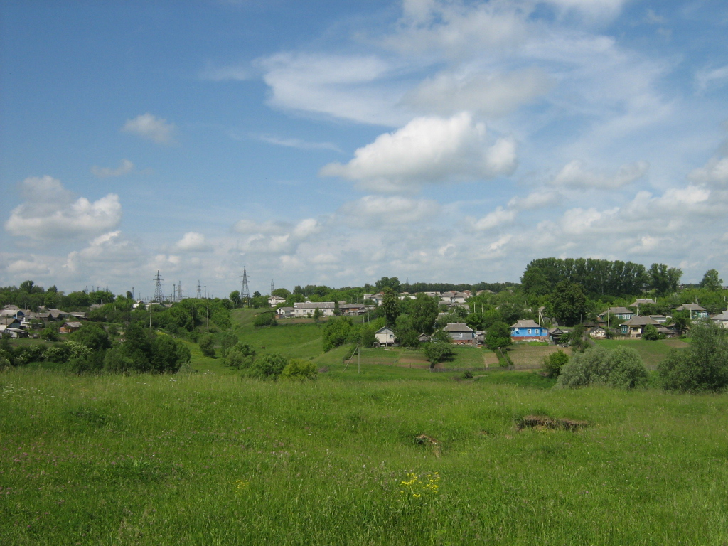 Крупец